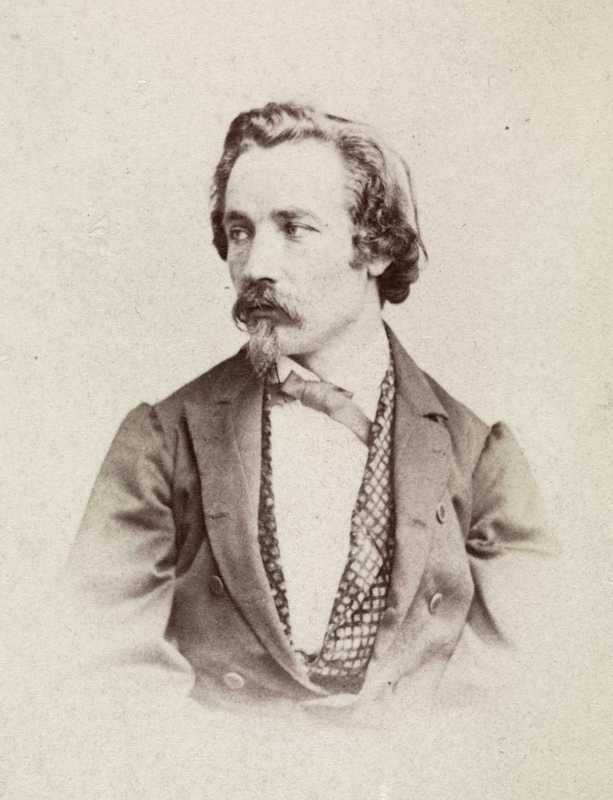 Portrett av billedhuggeren Ole Fladager. Tilhører Oslo Museum